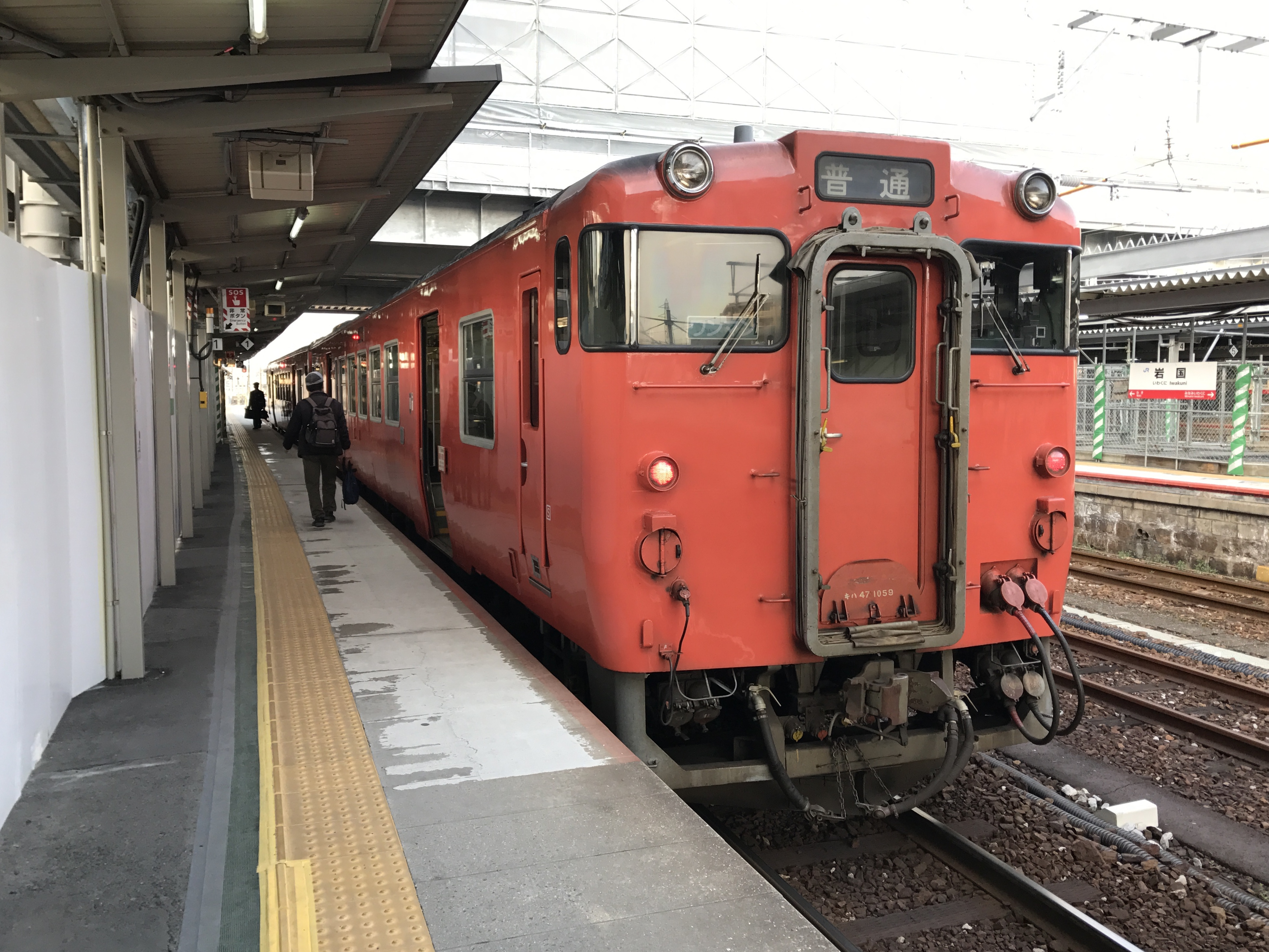 岩国駅(岩徳線)のホームと徳山行き普通列車